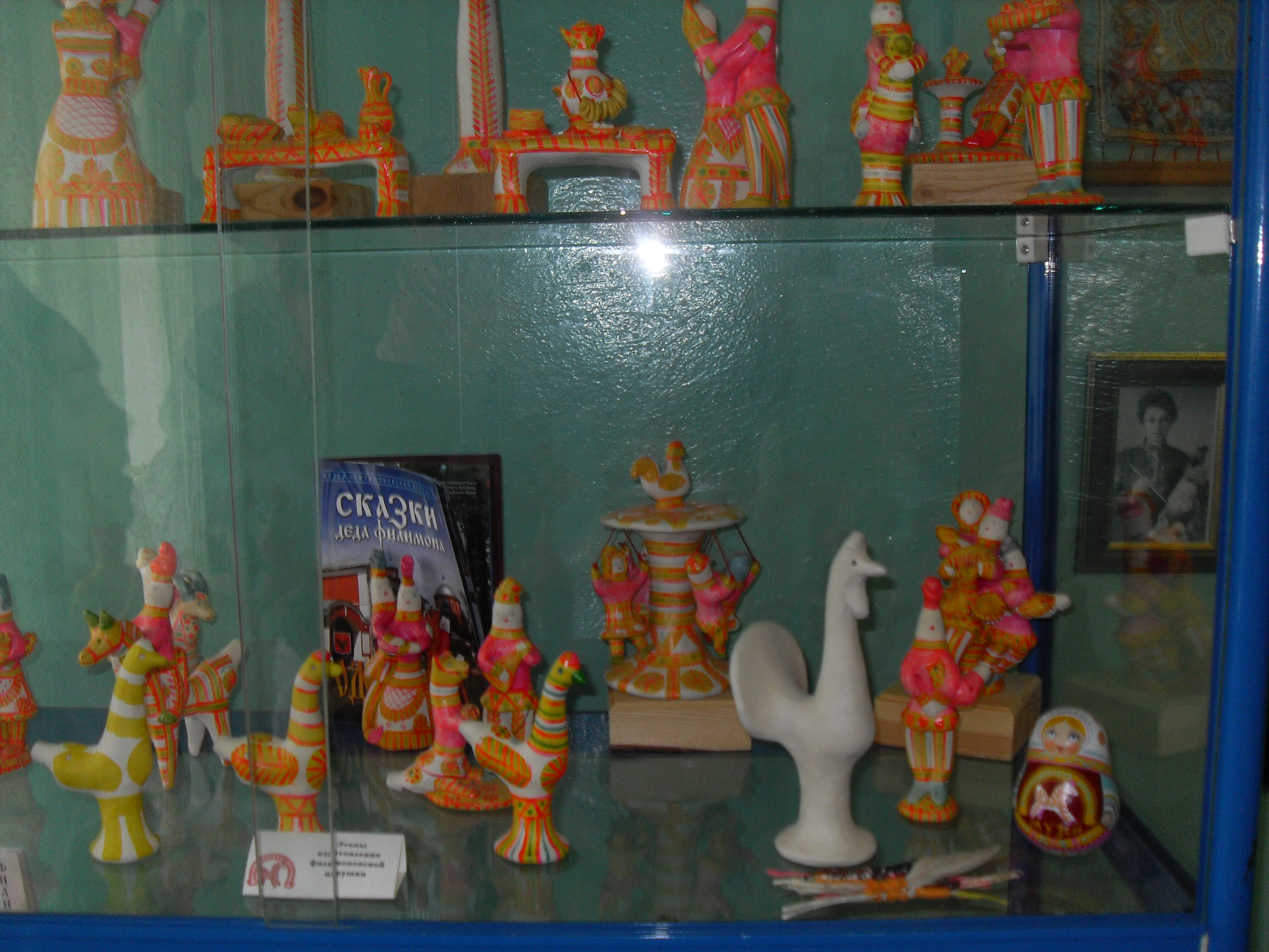 Экспозиция в музее "Филимоновская игрушка"